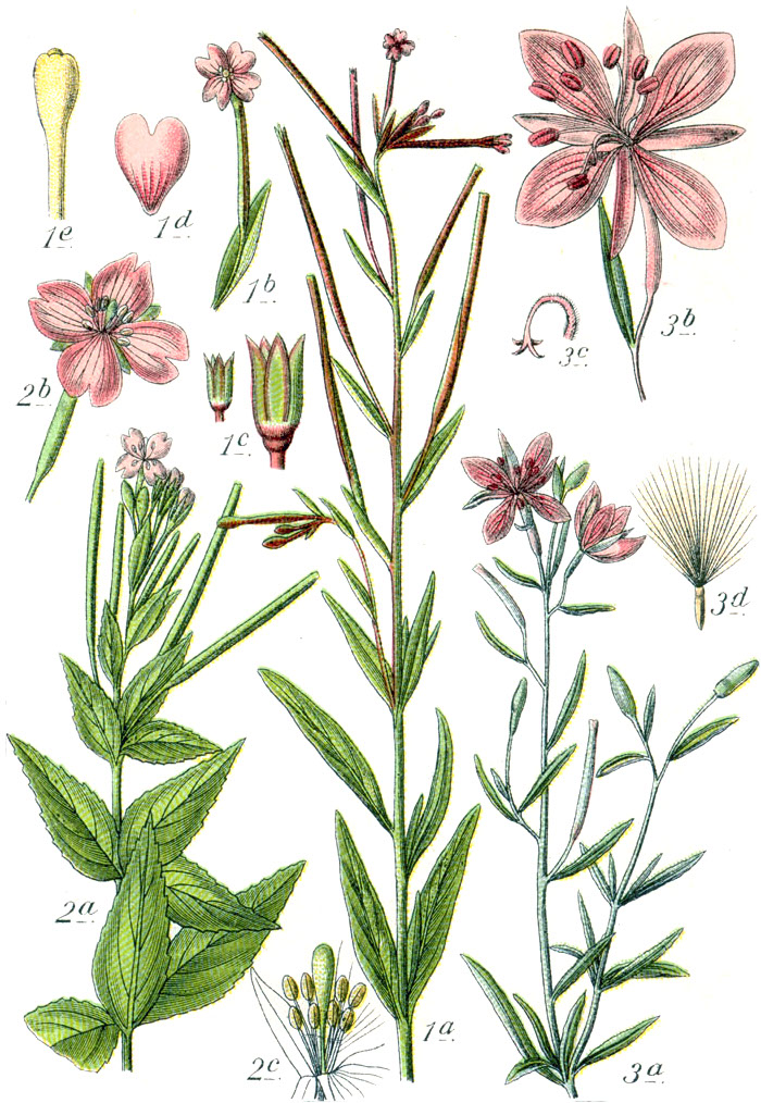 1. Epilobium palustre L. 2. Epilobium alpestre (Jacq.) Krock., syn. Epilobium trigonum Schrank 3. Epilobium fleischeri Hochst. Original Caption 1. Sumpfröschen, Epilobium palustre 2. Dreikantiges Weidenröschen, E. trigonum 3. Fleischer-Röschen, E. fleischeri